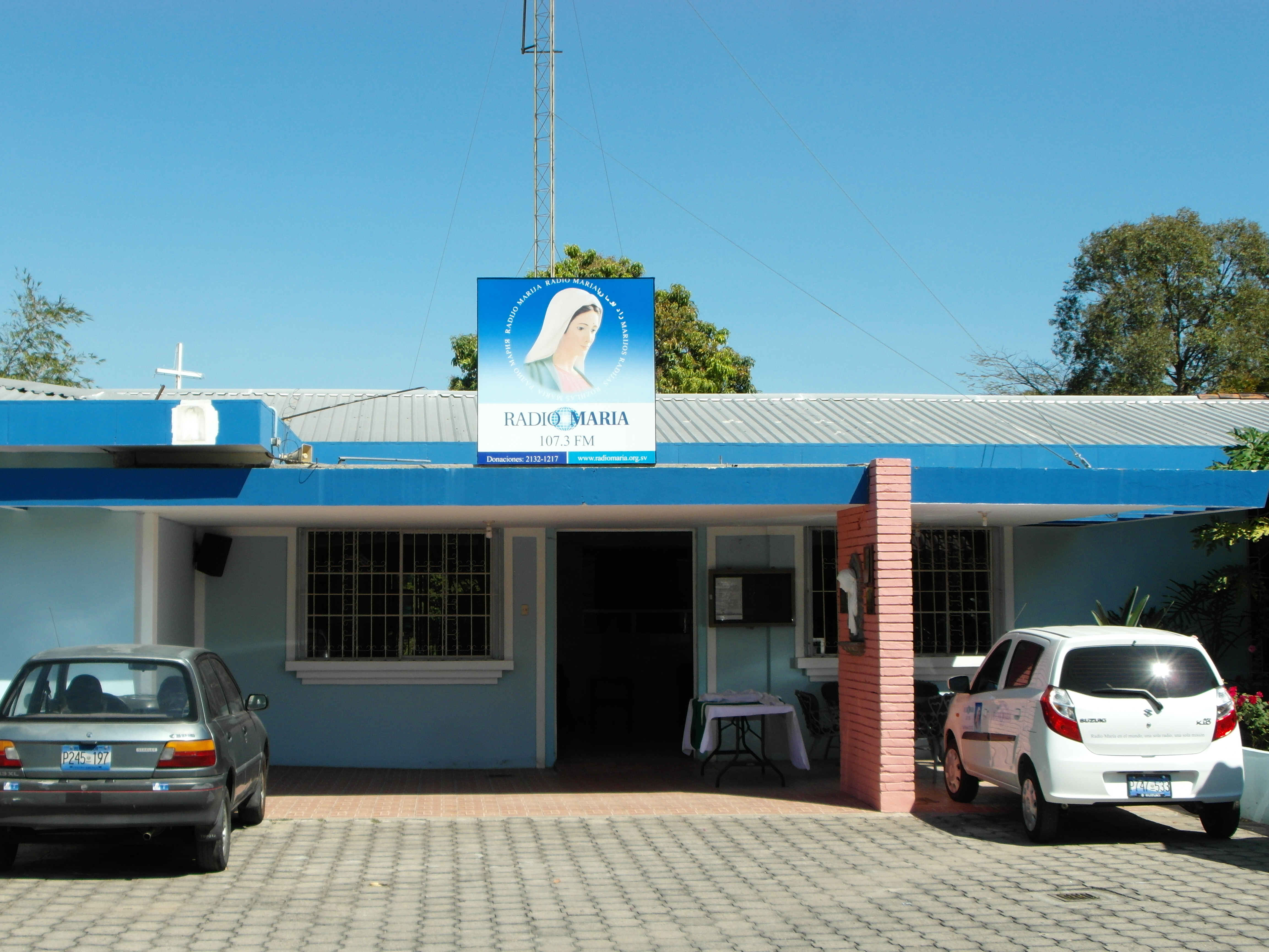 ubicación de Radio María El Salvador